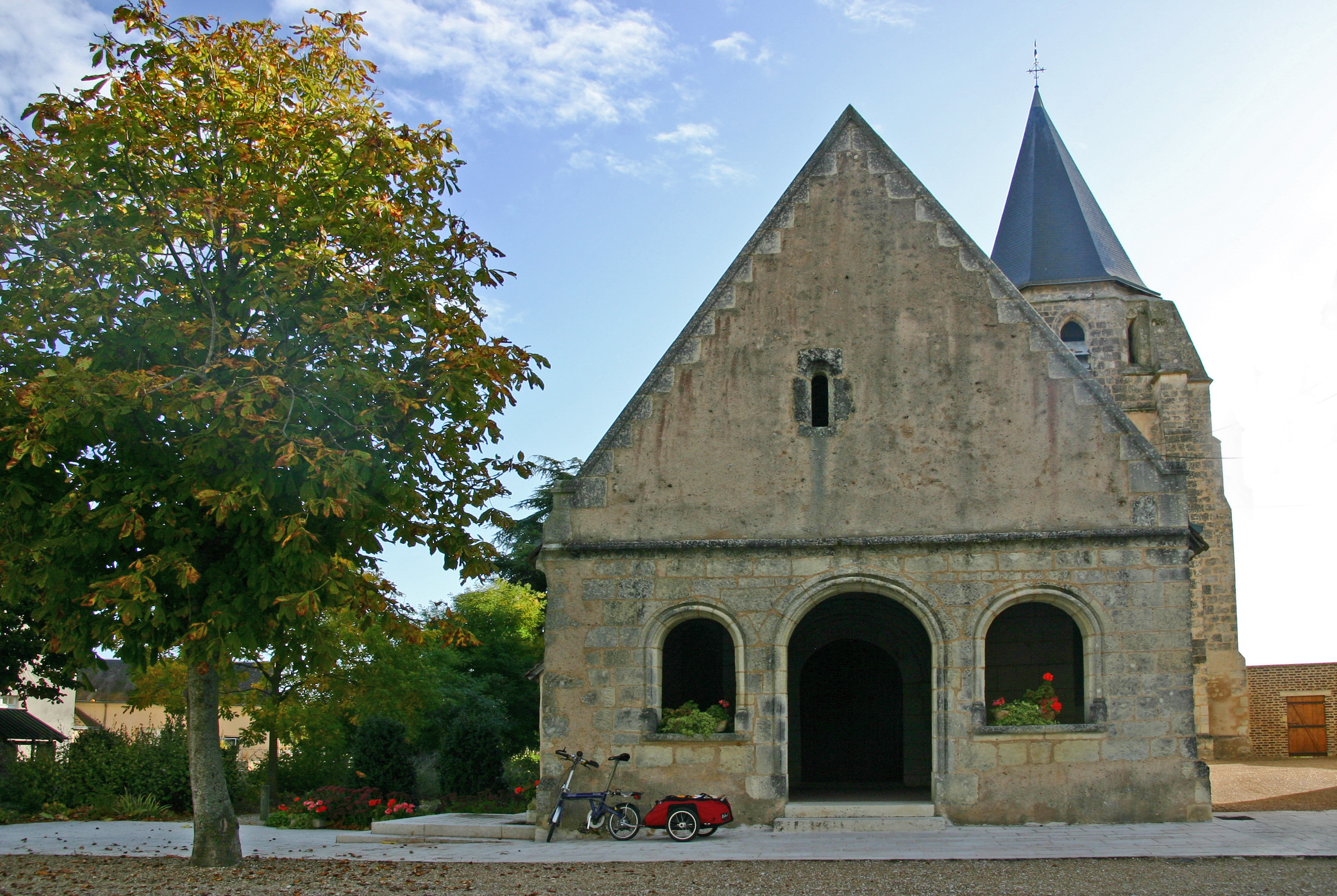 Saint-Martin-des-Bois